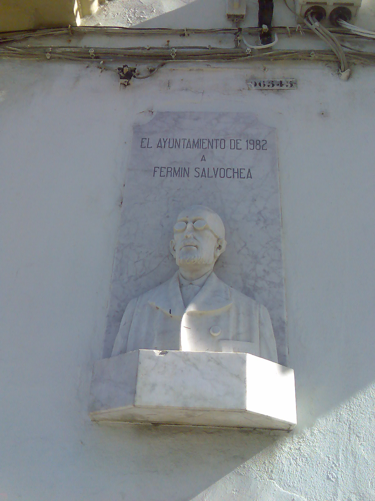 Detalle del busto dedicado a Fermín Salvochea en la plaza de Arguelles nº 10 en Cádiz, España.